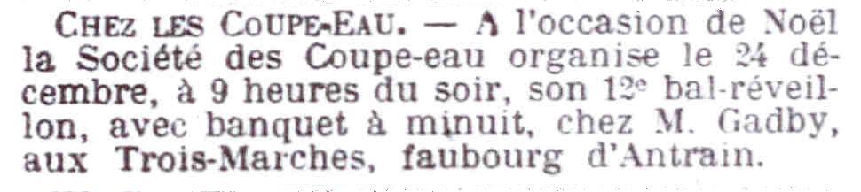 Annonce du réveillon de la société bigophonique rennaise « Les Coupe-eau ».